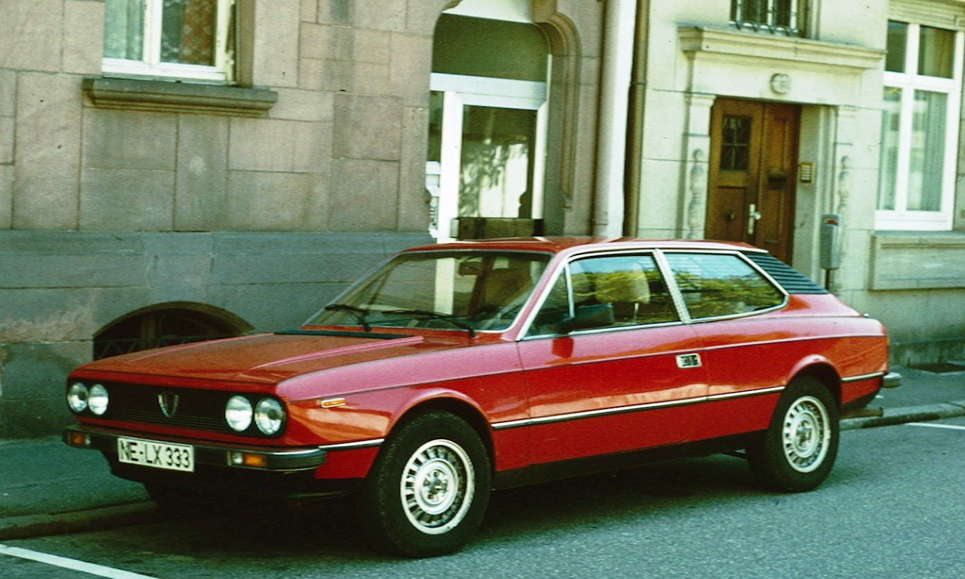 Lancia Beta from Neuss